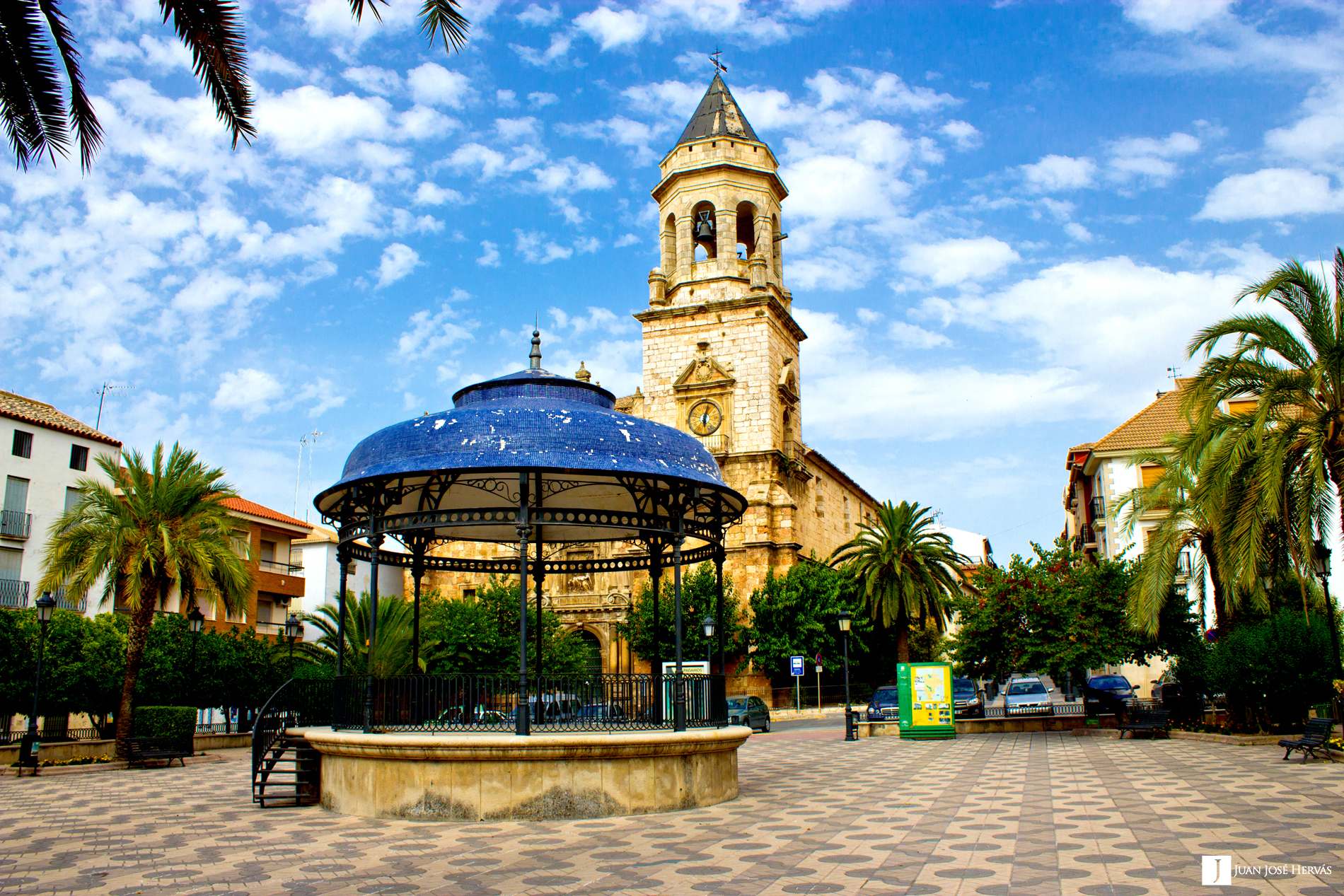 Iglesia de San Juan Evangelista y Plaza de la Constitucion de Mancha Real